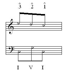 terzzug from Schenkers Reduktionsanalyse